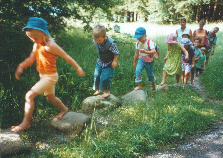 Kinder auf dem Barfußpfad